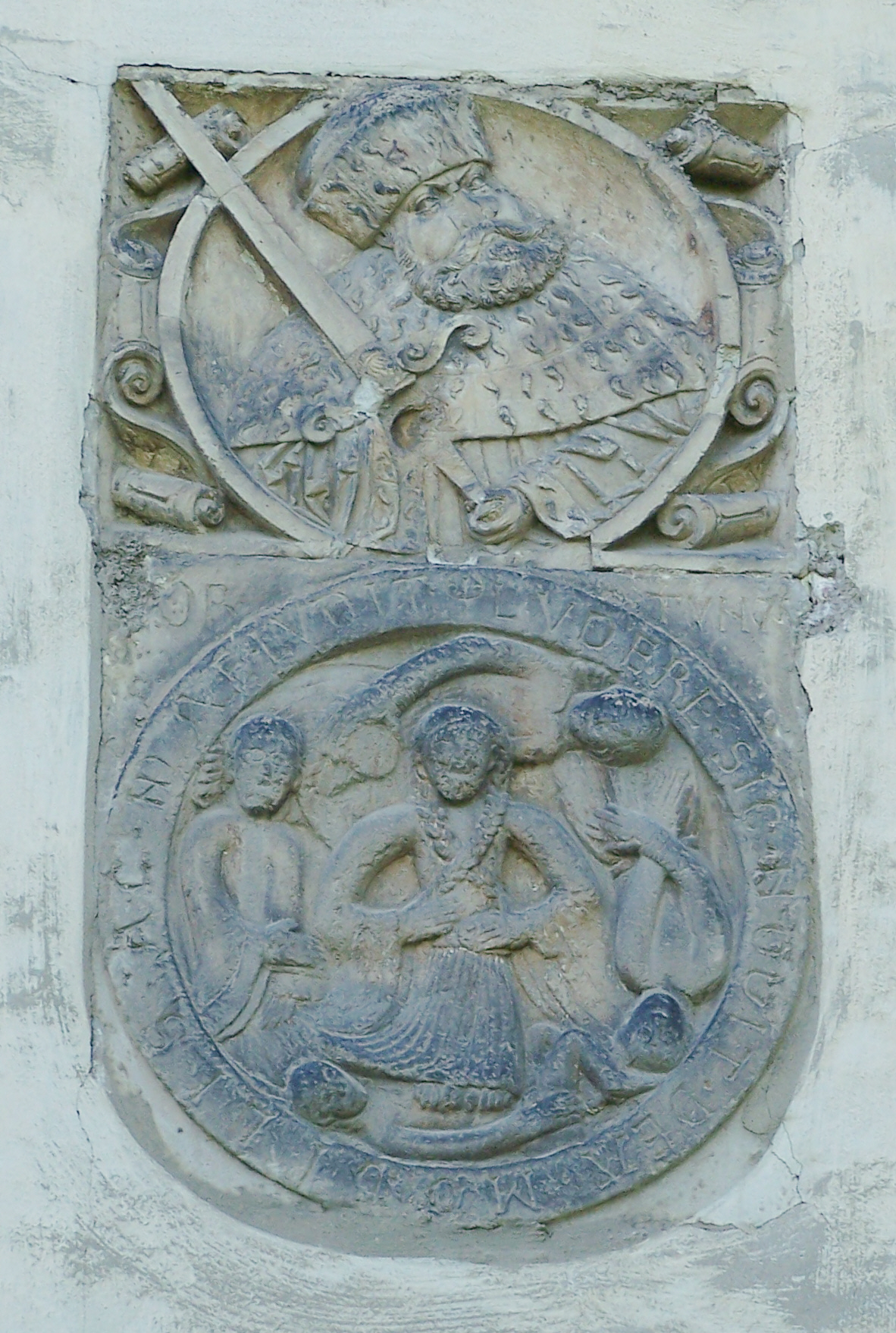 Steintafel an der Ostfassade von Schloss Friedenstein, sie ist zweiteilig und zeigt im oberen Feld den Landesherren Johann Friedrich I. (Sachsen) mit den Insignien des Kurfürsten und im unteren Feld das Schicksalsrad mit der Göttin Fortuna als allegorische Darstellung.